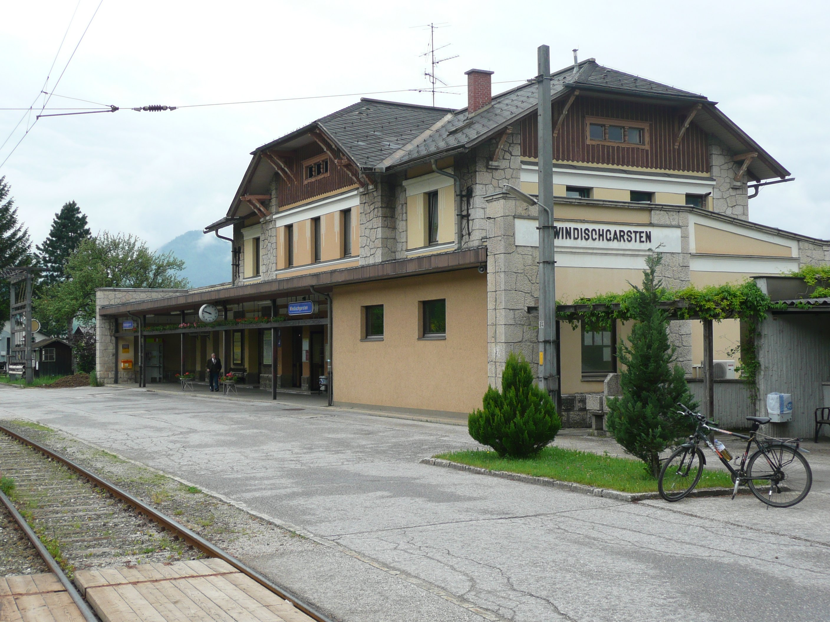 Bahnhof Windischgarsten